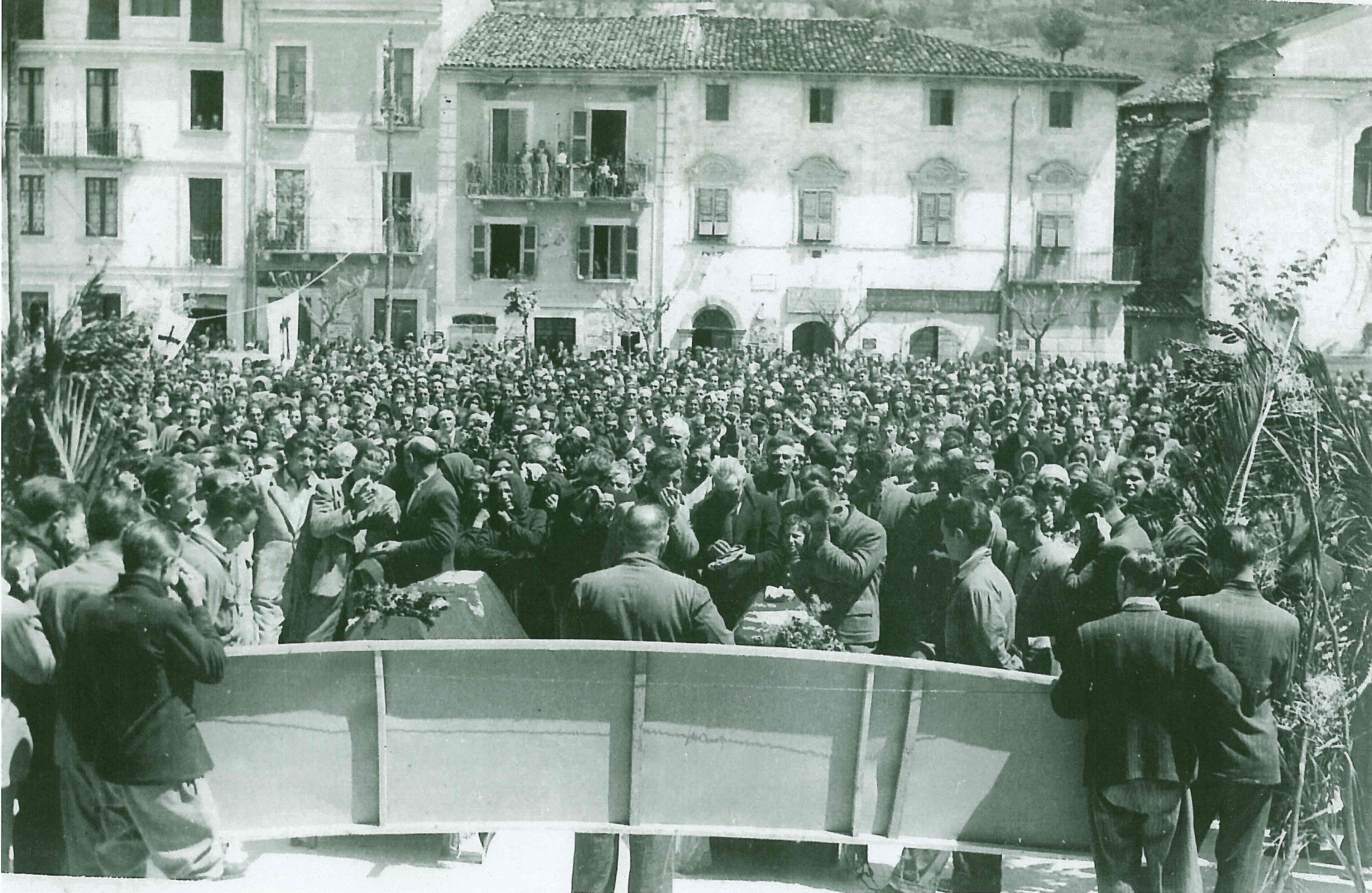 Veduta della piazza dal palco dove si tenne il comizio. Celano 3 maggio 1950.